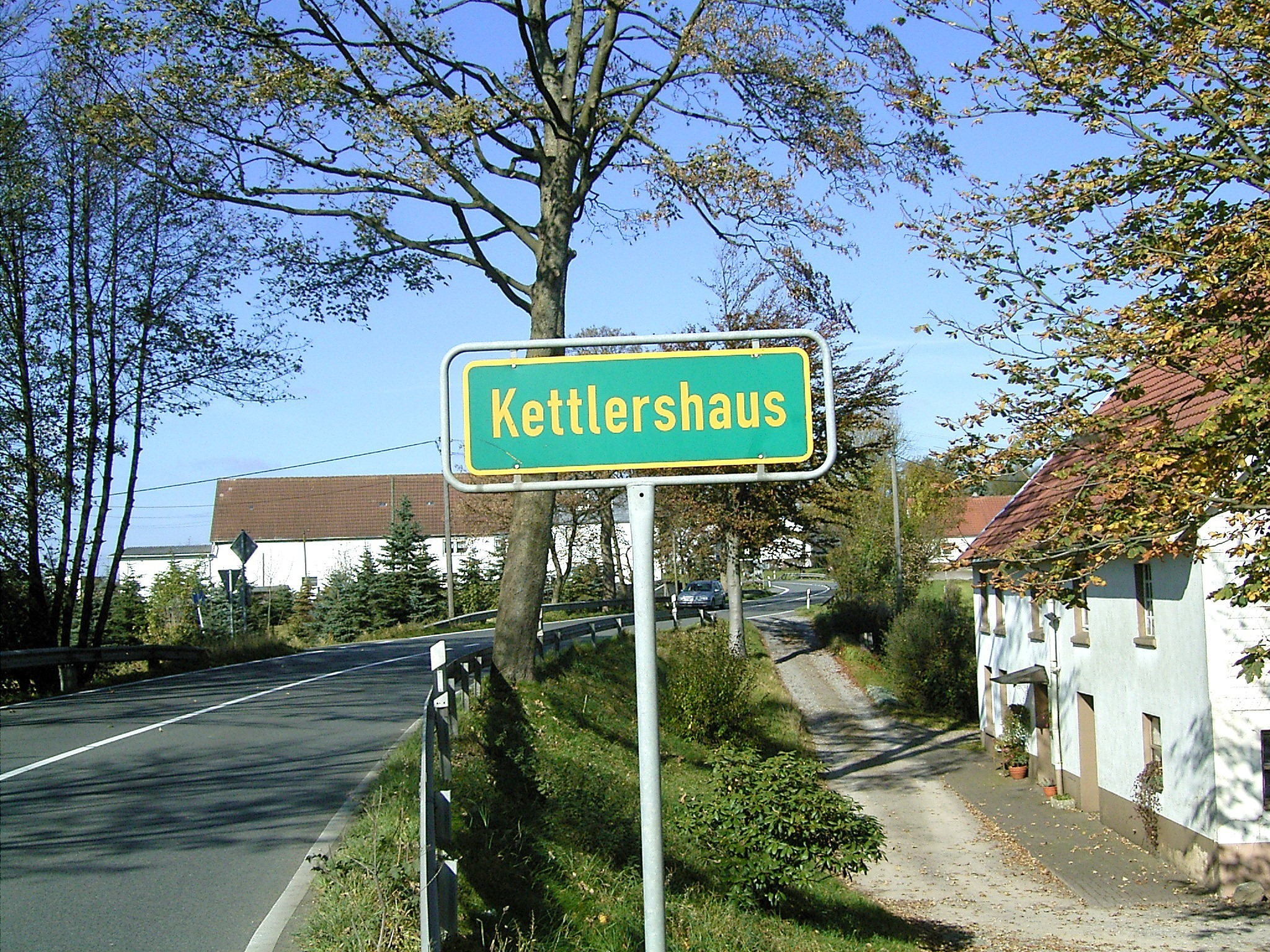 Radevormwald